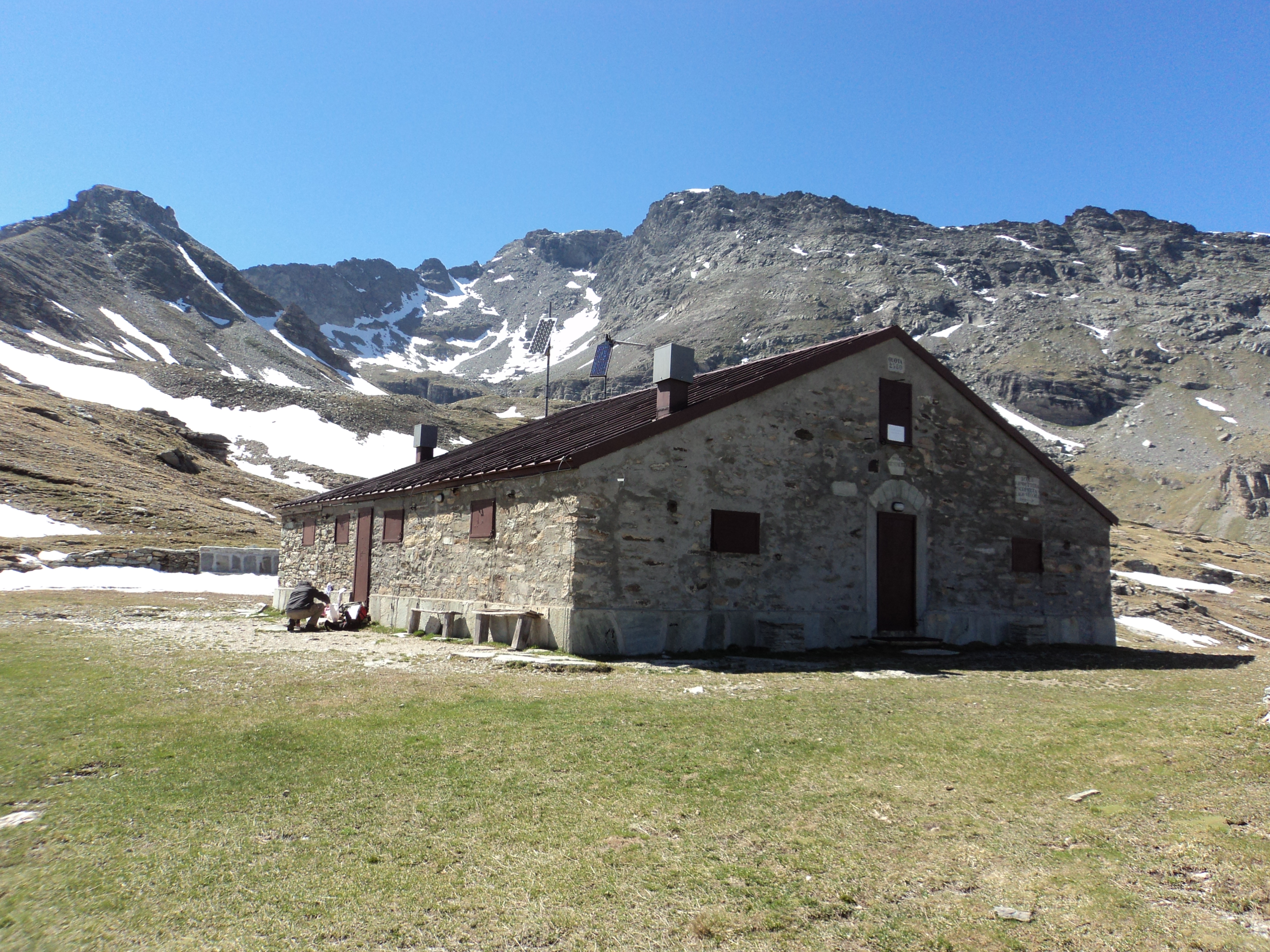 Rifugio Avanzà - Comene di Venaus - Alpi Cozie